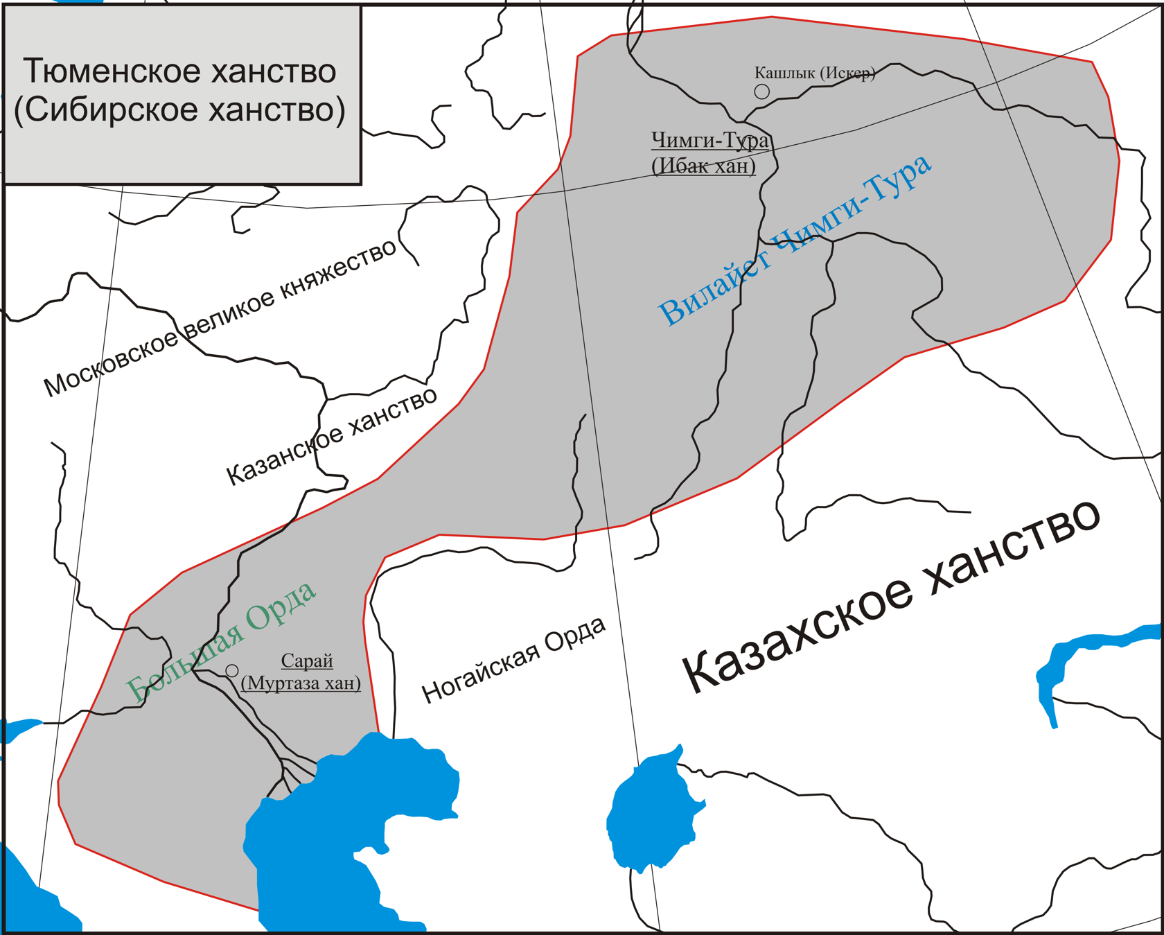 Карта Тюменского ханство